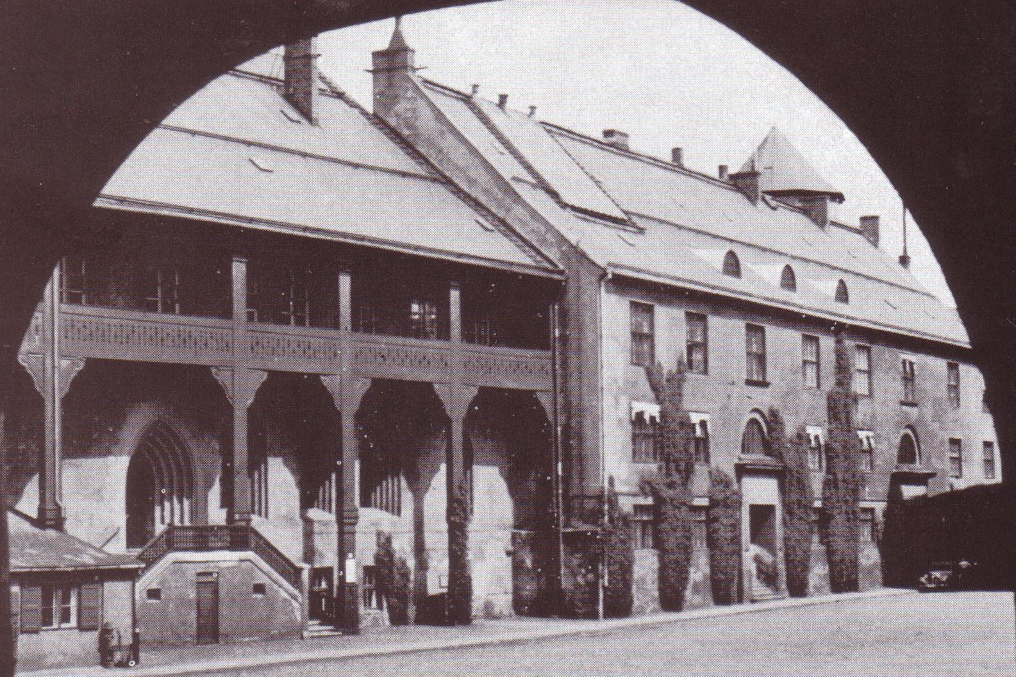 Fotogtafie des Oberlandesgerichts im Königsberger Schloss, ganz links das "Blutgericht"